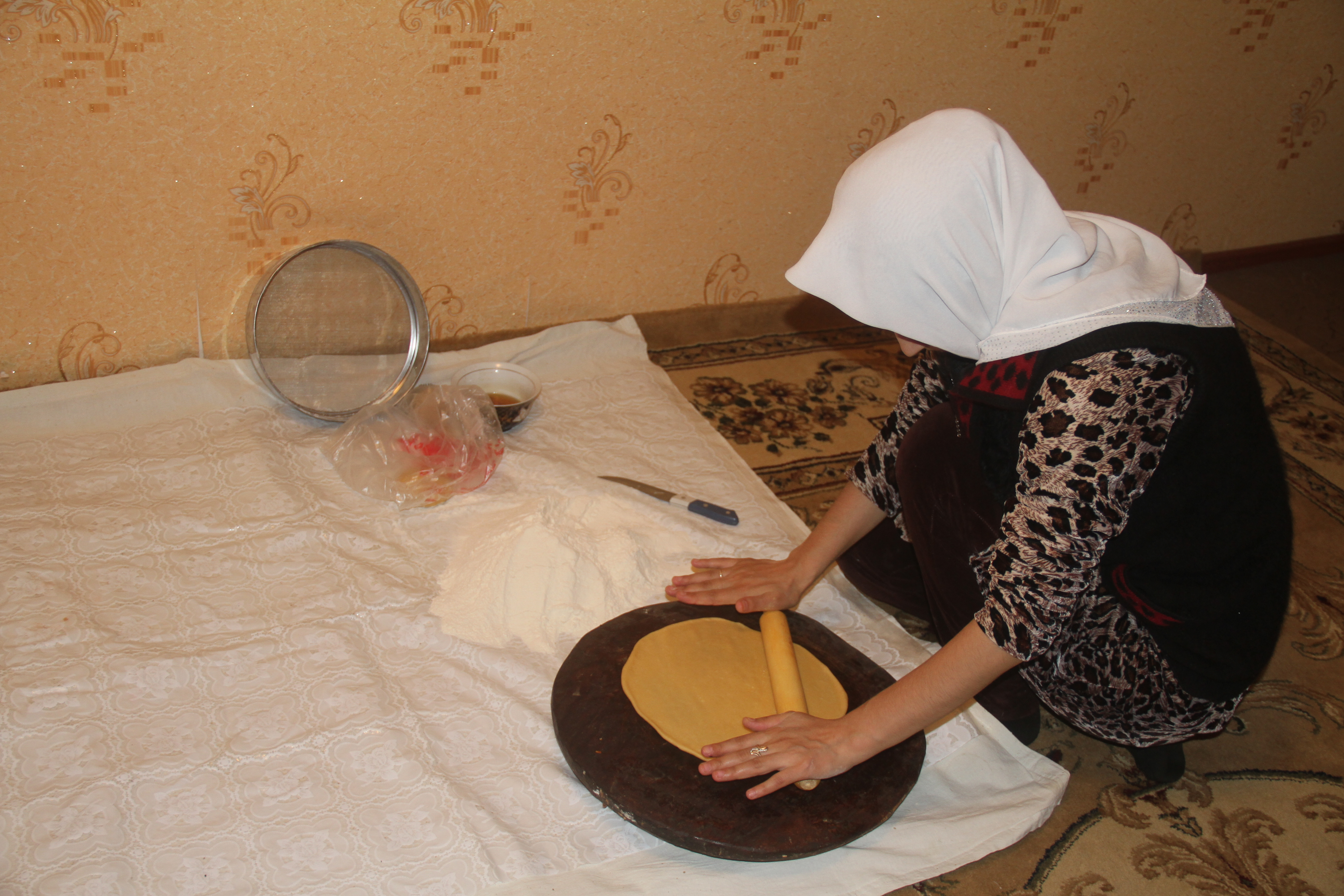 Тоҷикӣ: Чак-чак (4)